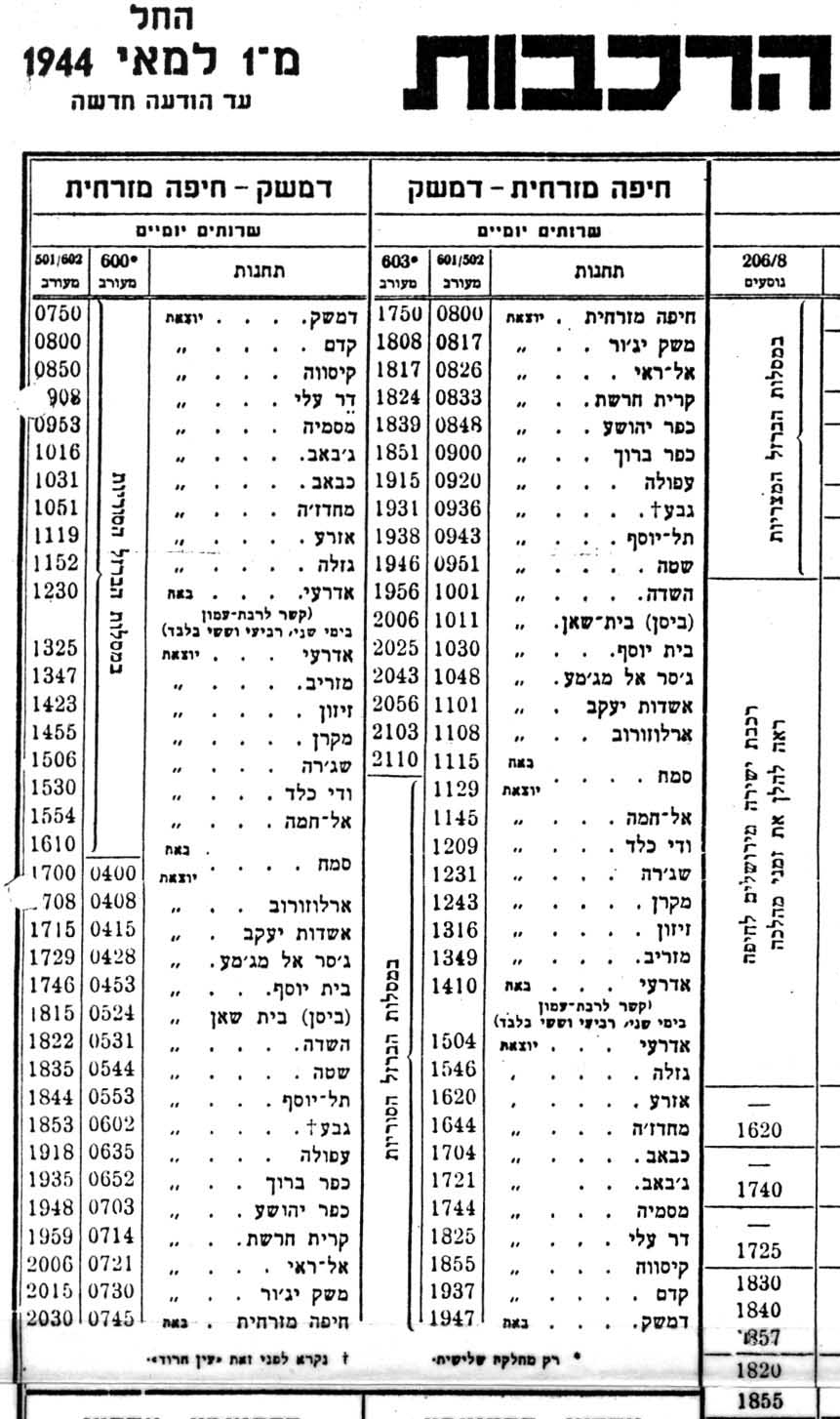 לוח זמנים של הרכבת מחיפה לדמשק וחזרה. קטע מתוך לוח זמנים של הרכבת המנדטורית אשר ניכנס לתוקף החל מ-1 במאי 1944 . תמונה זו היא חיתוך מתמונת המקור (ראו למטה בגרסאות אחרות).